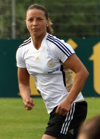 Inka Grings Cropped from File:Deutsche Frauen-Nationalmannschaft 5.jpg